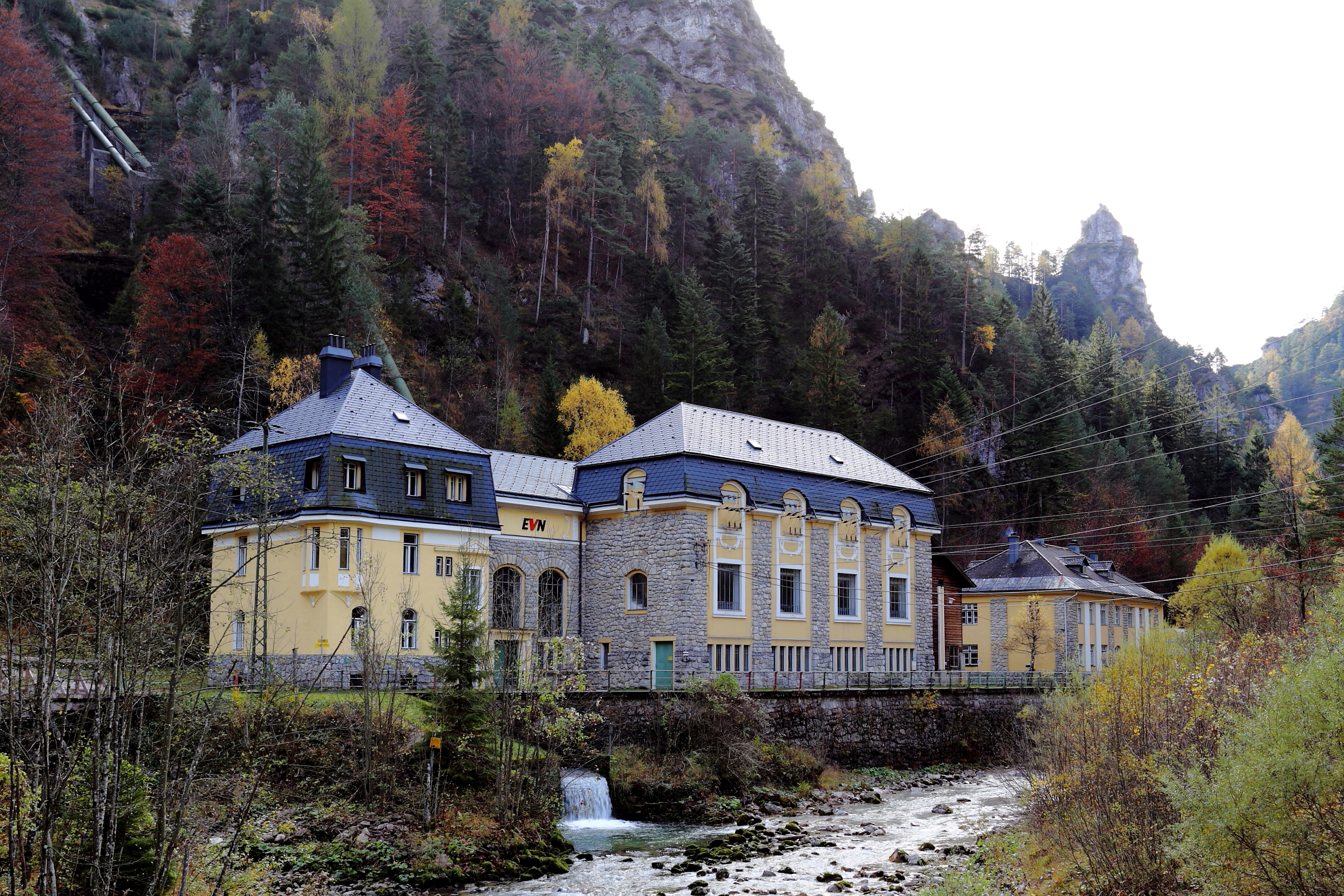 Das niederösterreichische Kraftwerk Wienerbruck am Ende der Ötschergräben bzw. der Tormäuer (Gemeindegrenze Annaberg/Mitterbach am Erlaufsee). Das Kraftwerk wurde von 1908 bis 1911 im Zuge der Elektrifizierung der Mariazellerbahn errichtet und war zu dieser Zeit das größte Speicherkraftwerk Österreich-Ungarns.